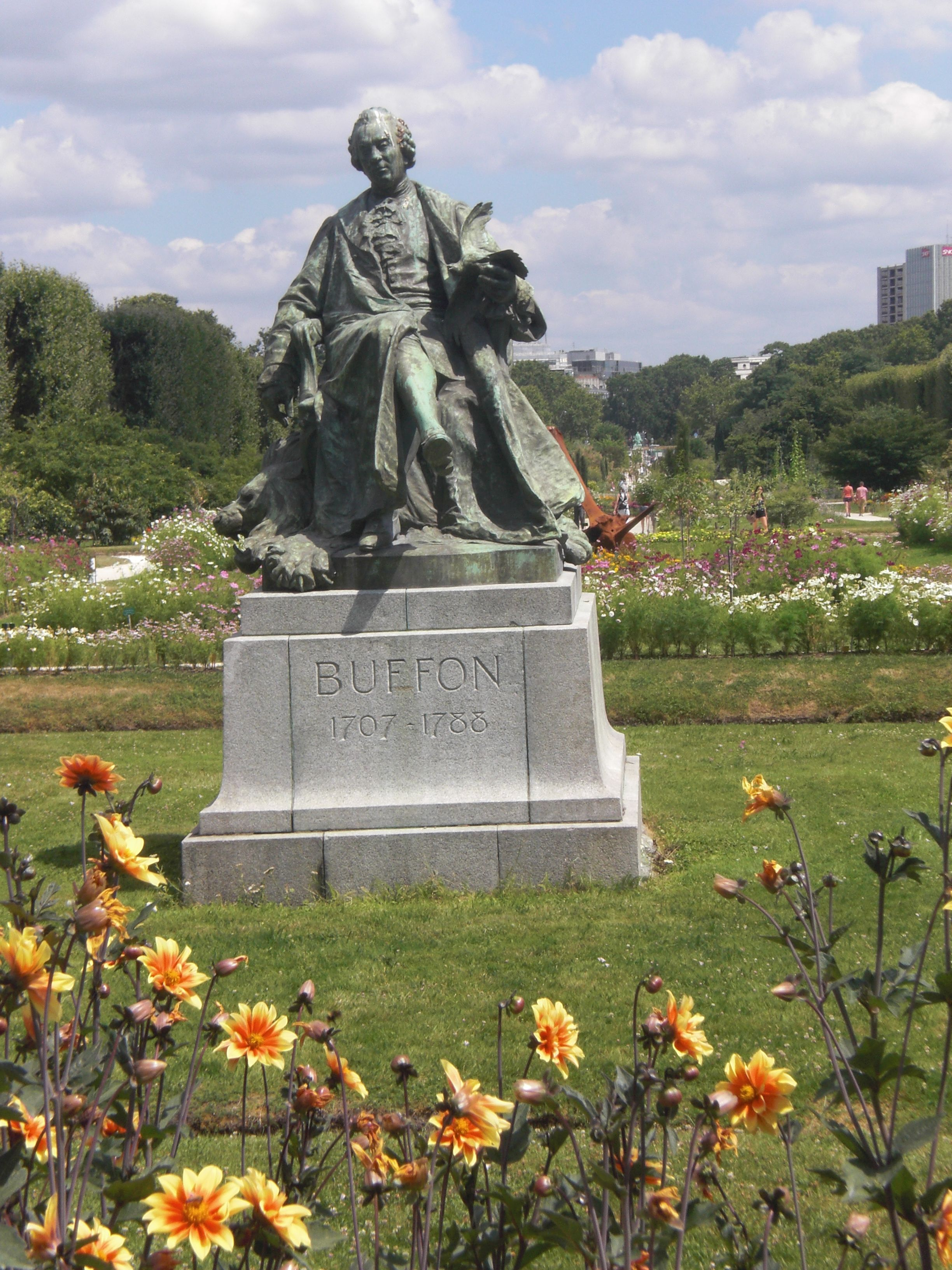 Statuo de Buffon en Parizo.